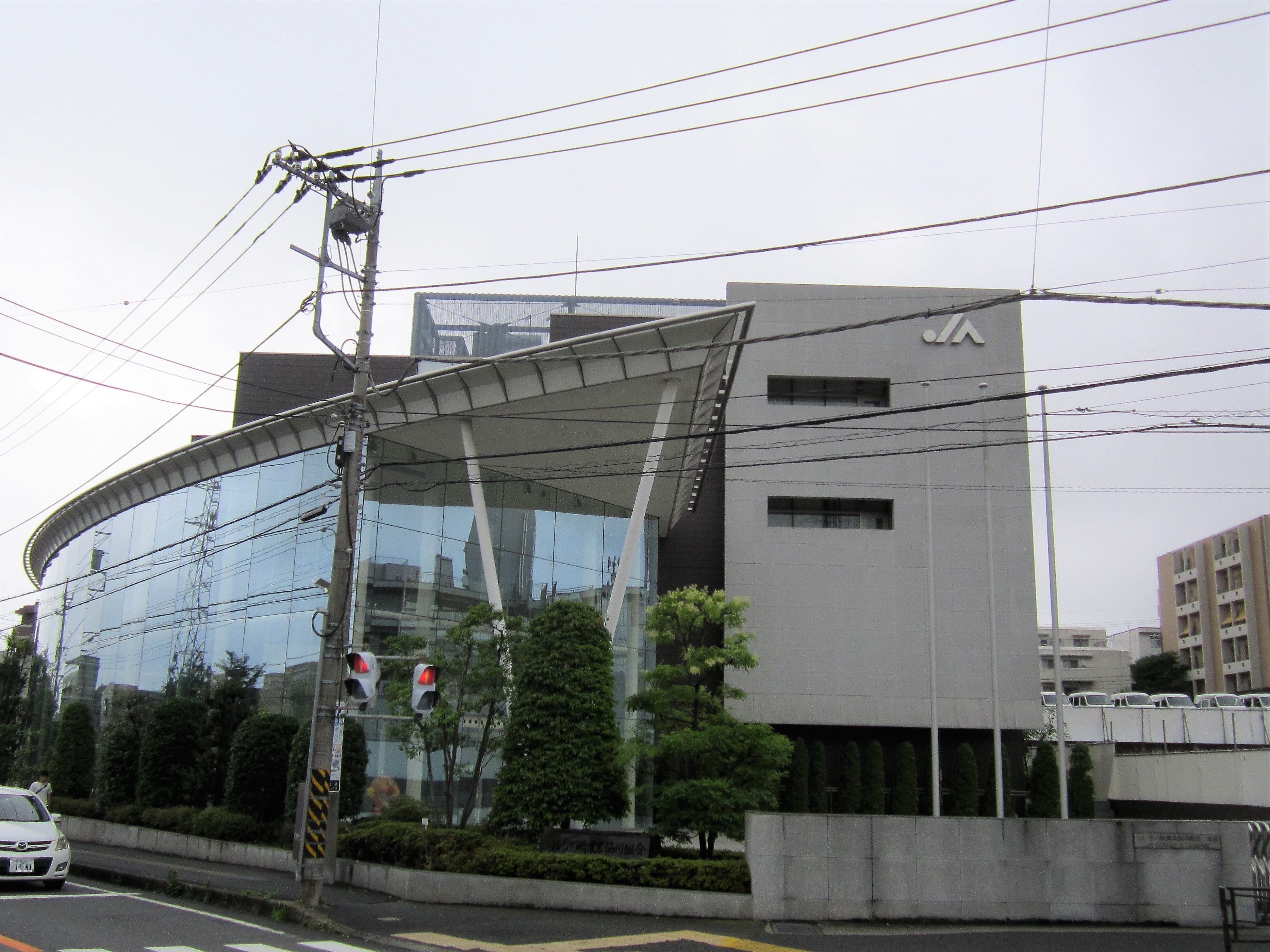 セレサ川崎農業協同組合 本店（川崎市宮前区宮崎）